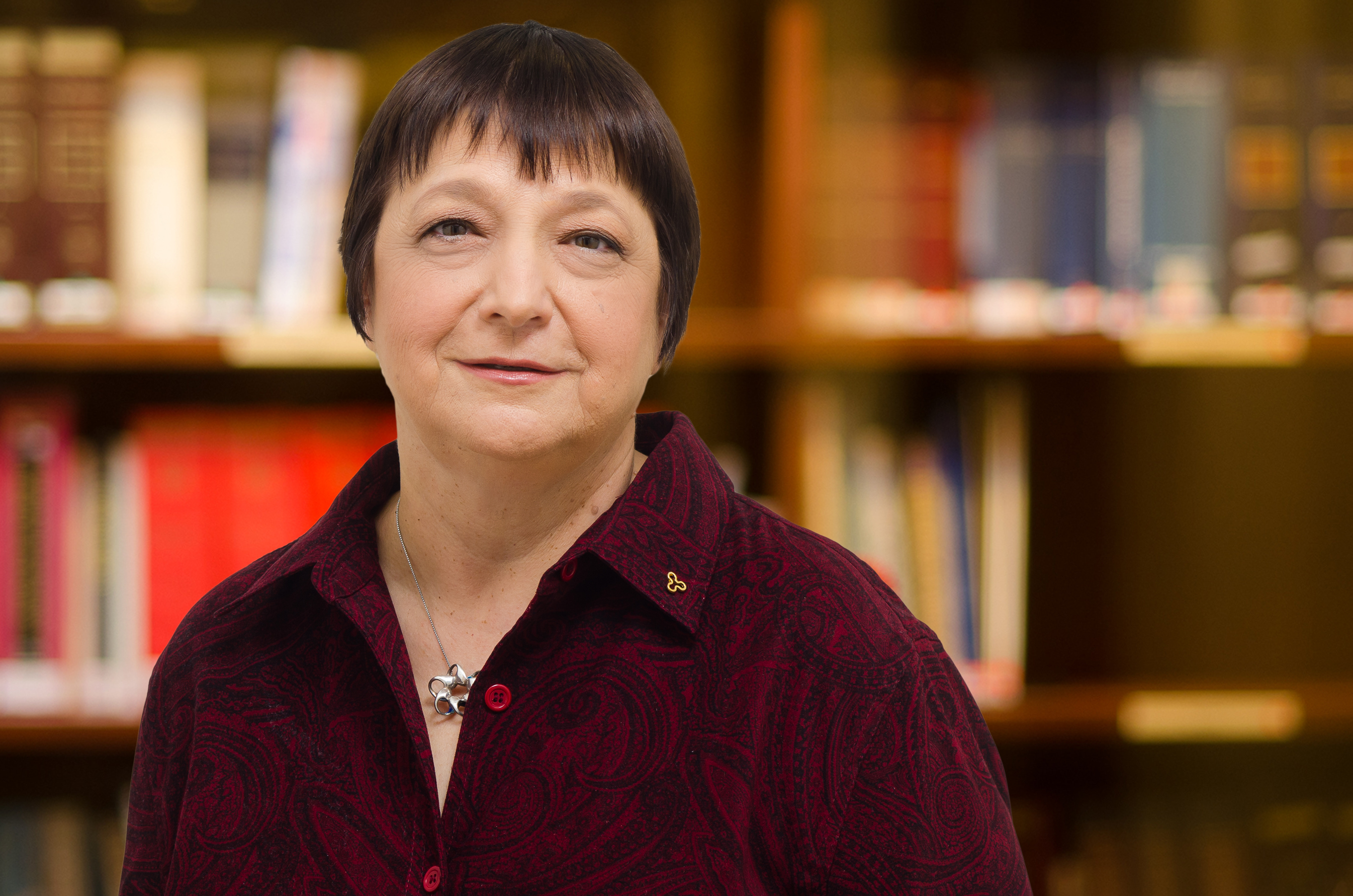 פרופסור מימי אייזנשטדט